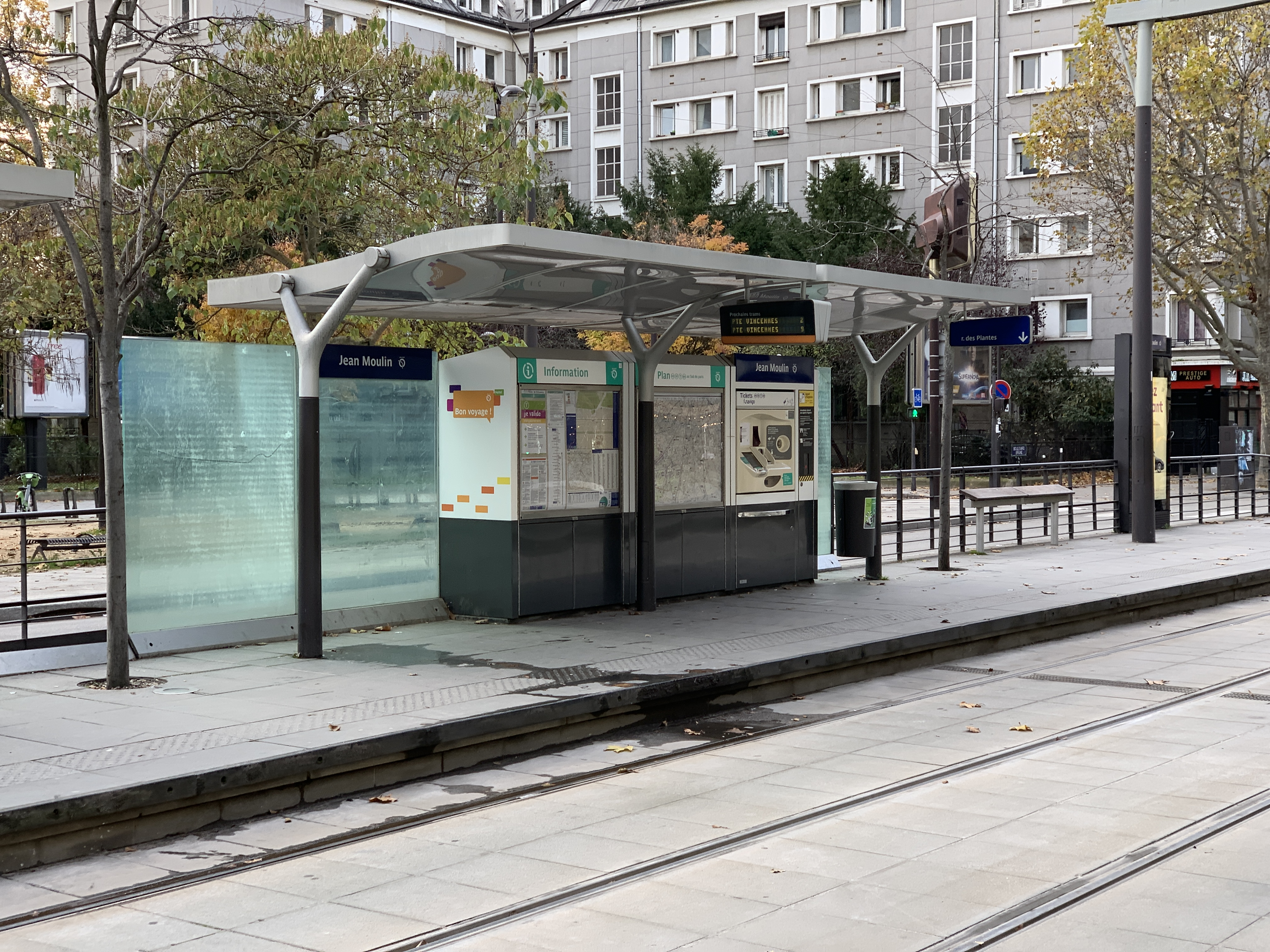 Station de la ligne 3a du tramway d'Île-de-France Jean Moulin, Paris.